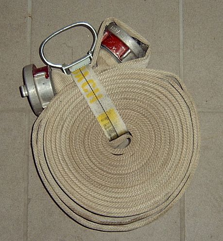 gerollter C-Schlauch